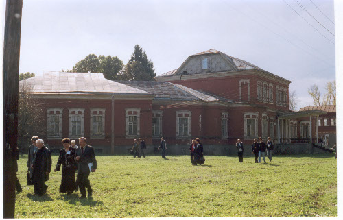 В 1970-е годы XIX в. на месте старого барского дома был построен новый, по проекту жены Бутурлина.